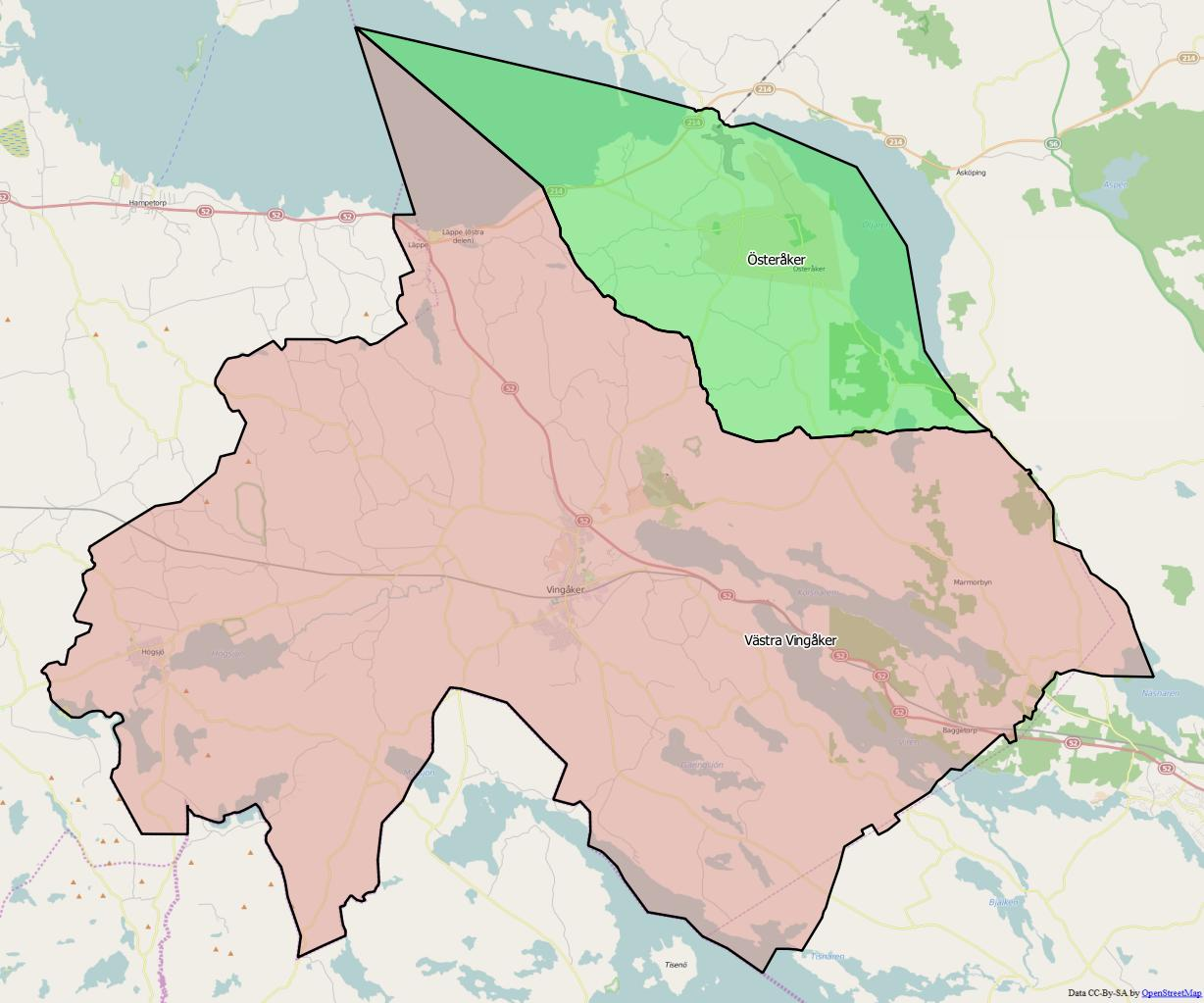 Distriktsindelningen i Vingåkers kommun World file 53.09989030709088098 0 0 -53.09989030709088098 1736200.16901126853190362 8221643.25140700116753578